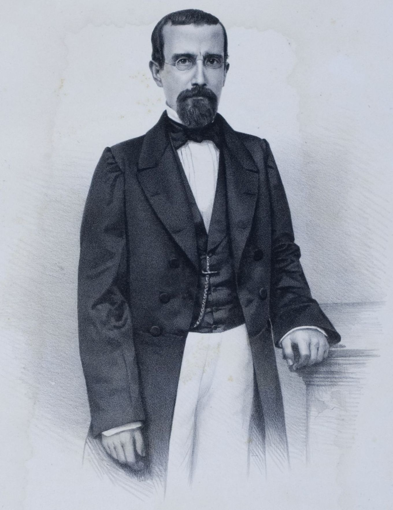 Litografia em preto e branco